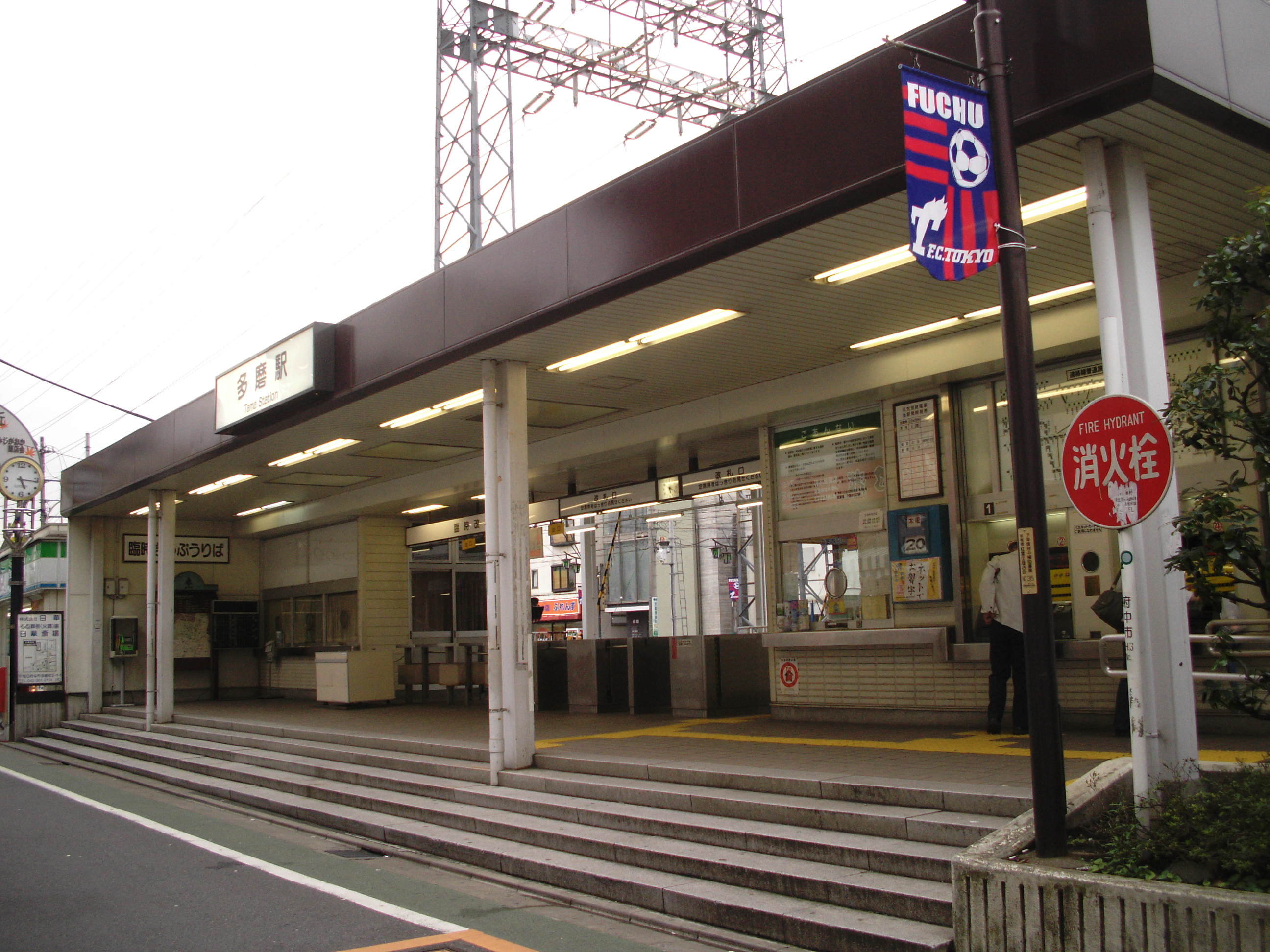 多磨駅